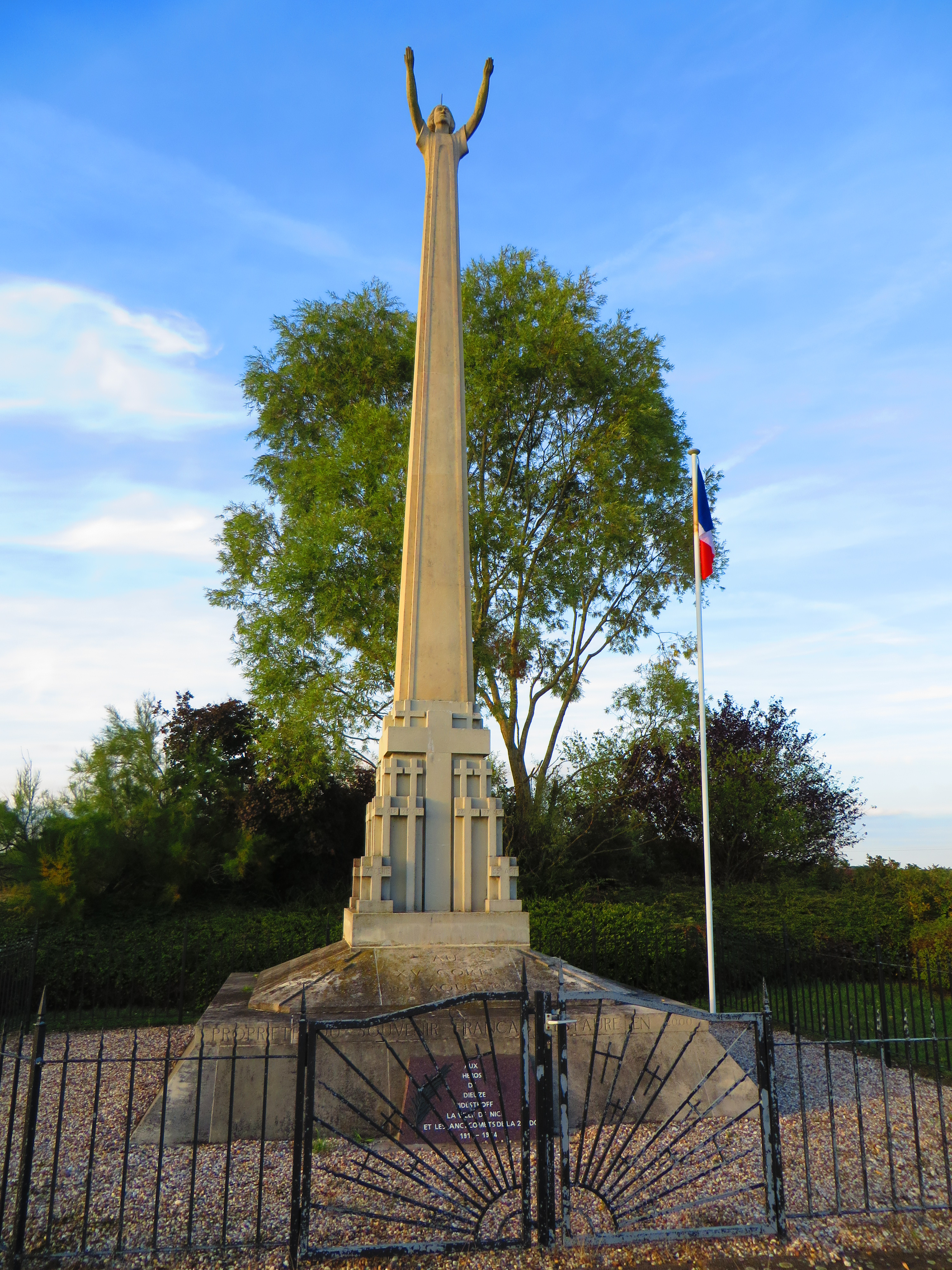 Bidestroff monument